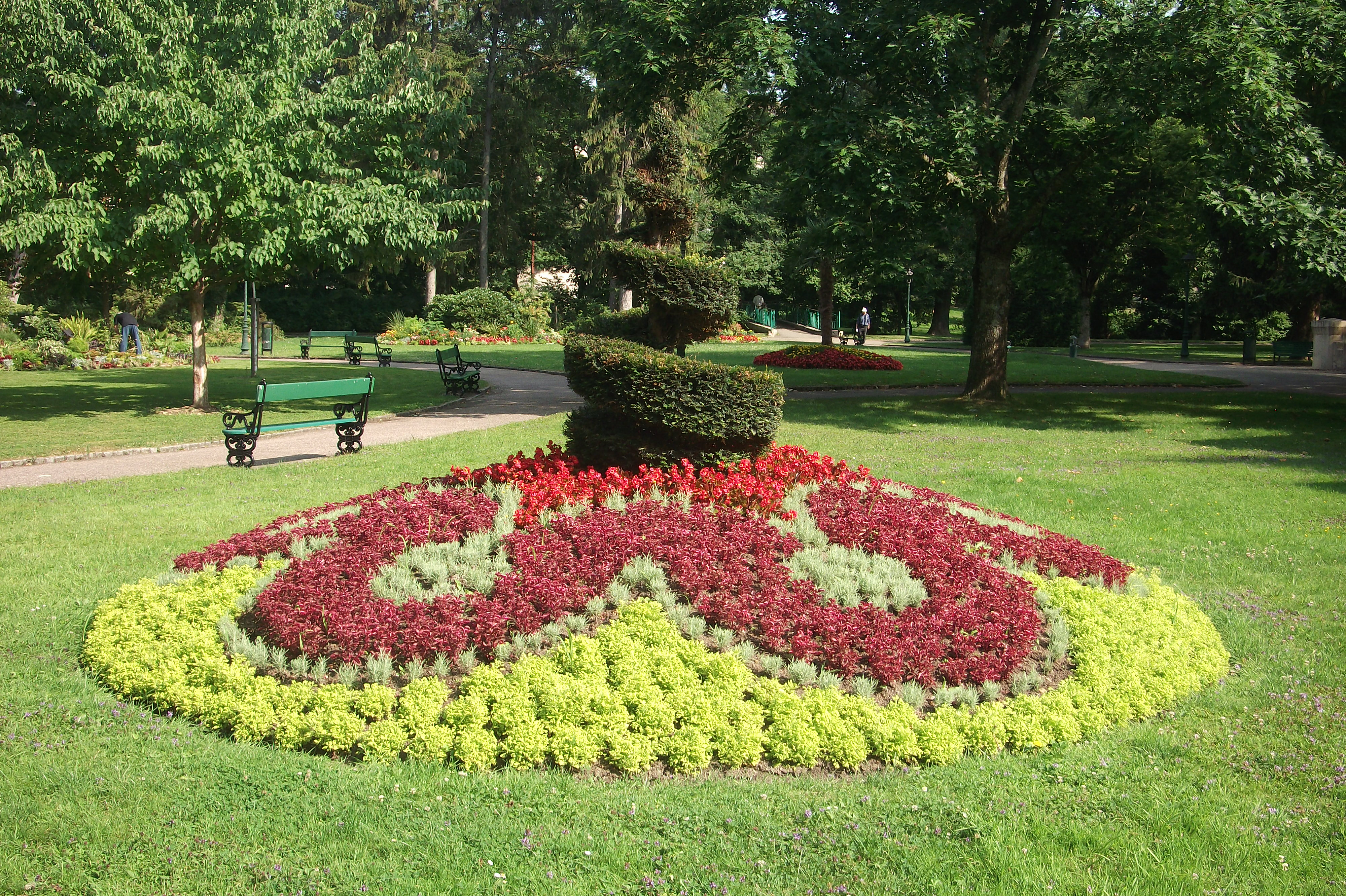 Le jardin anglais de Vesoul (Haute-Saône, Franche-Comté)